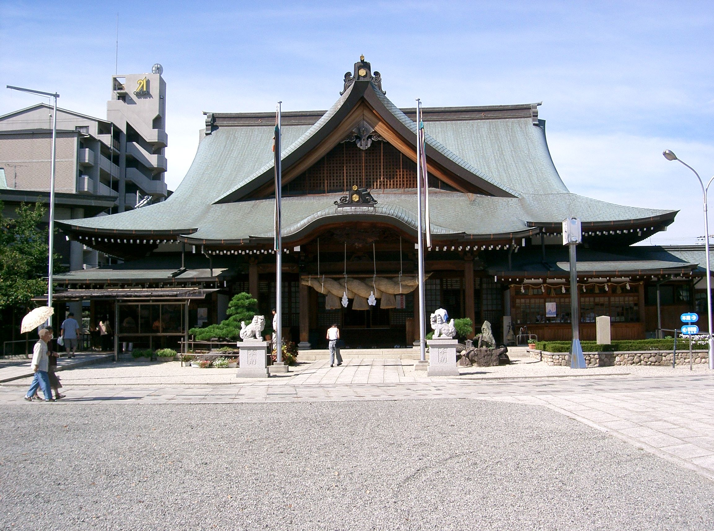 出雲大社大阪分祠 神楽殿